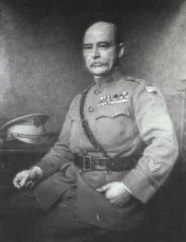 Stetka Gyula: Harry Hill Bandholtz (1864–1925) tábornok portréja (olajfestmény, 1920)